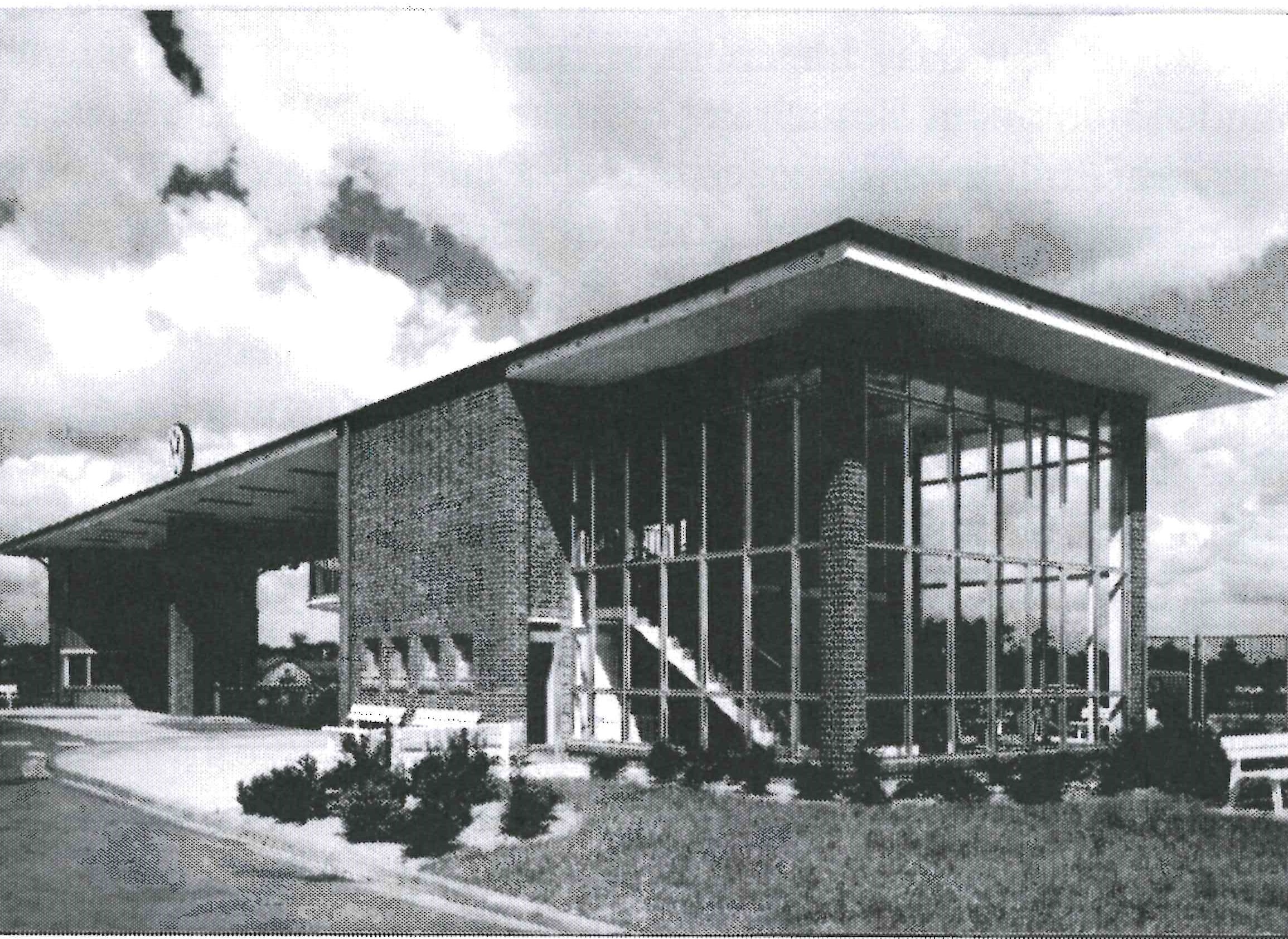 Wache Sandkamp VW-Werk Wolfburg